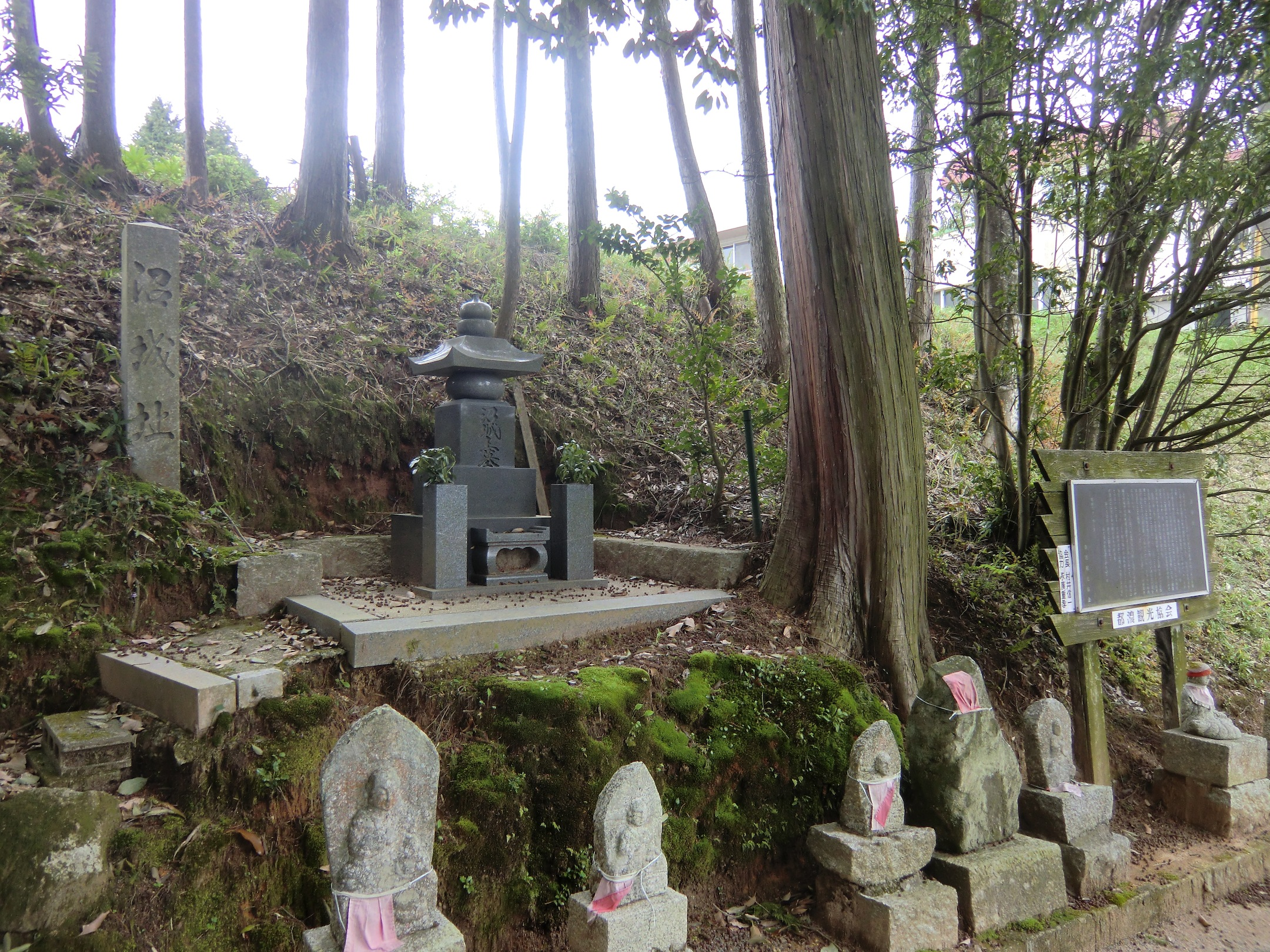 須々万沼城跡（山口県周南市須々万）